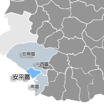 台南市安平區相對位置。